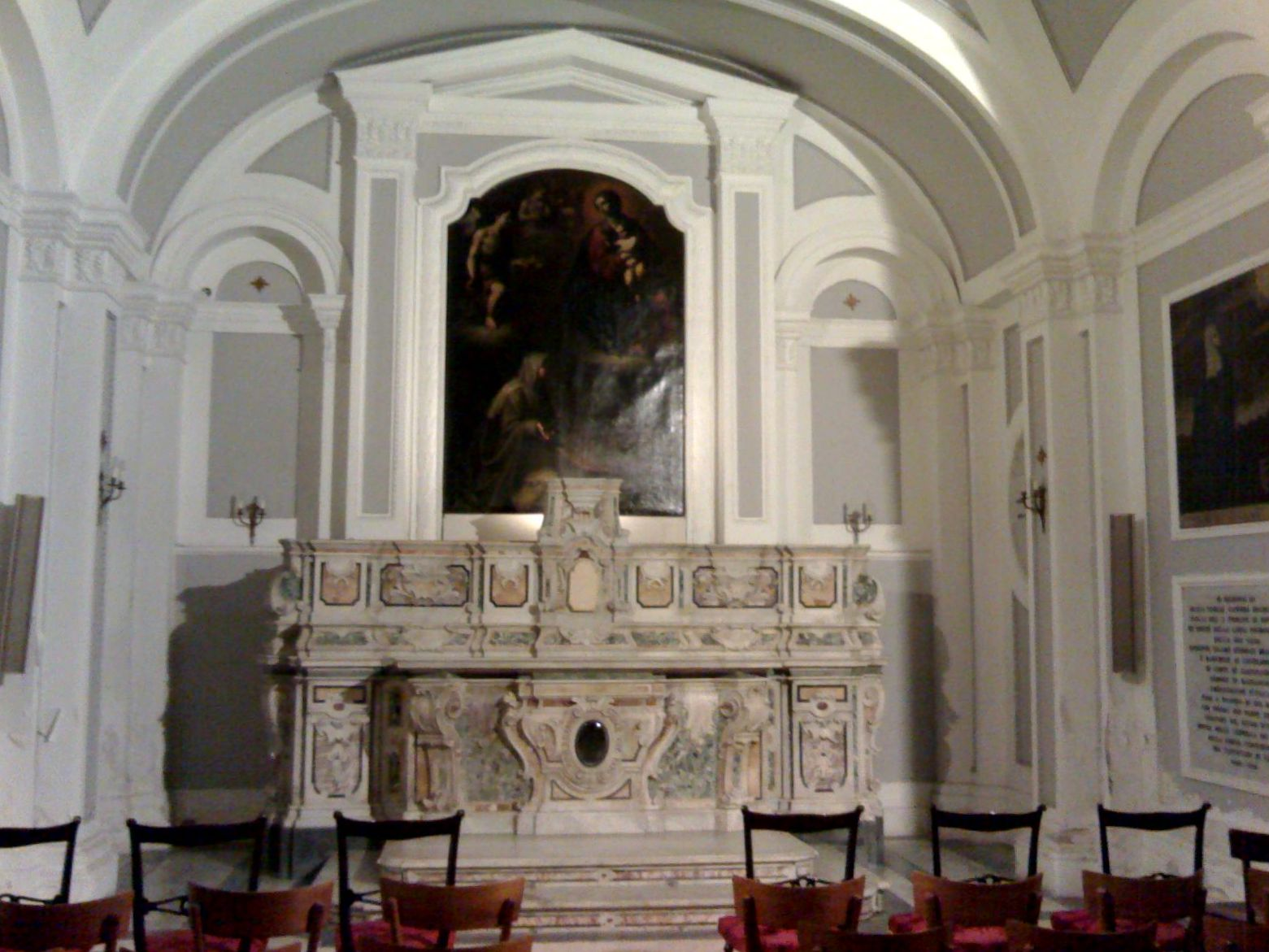 Cappella della chiesa di sant'Angelo a Nilo, Napoli. In fondo, sopra l'altare, la tela di Carlo Sellitto Apparizione della Vergine a Santa Candida (o Visione di Santa Candida).